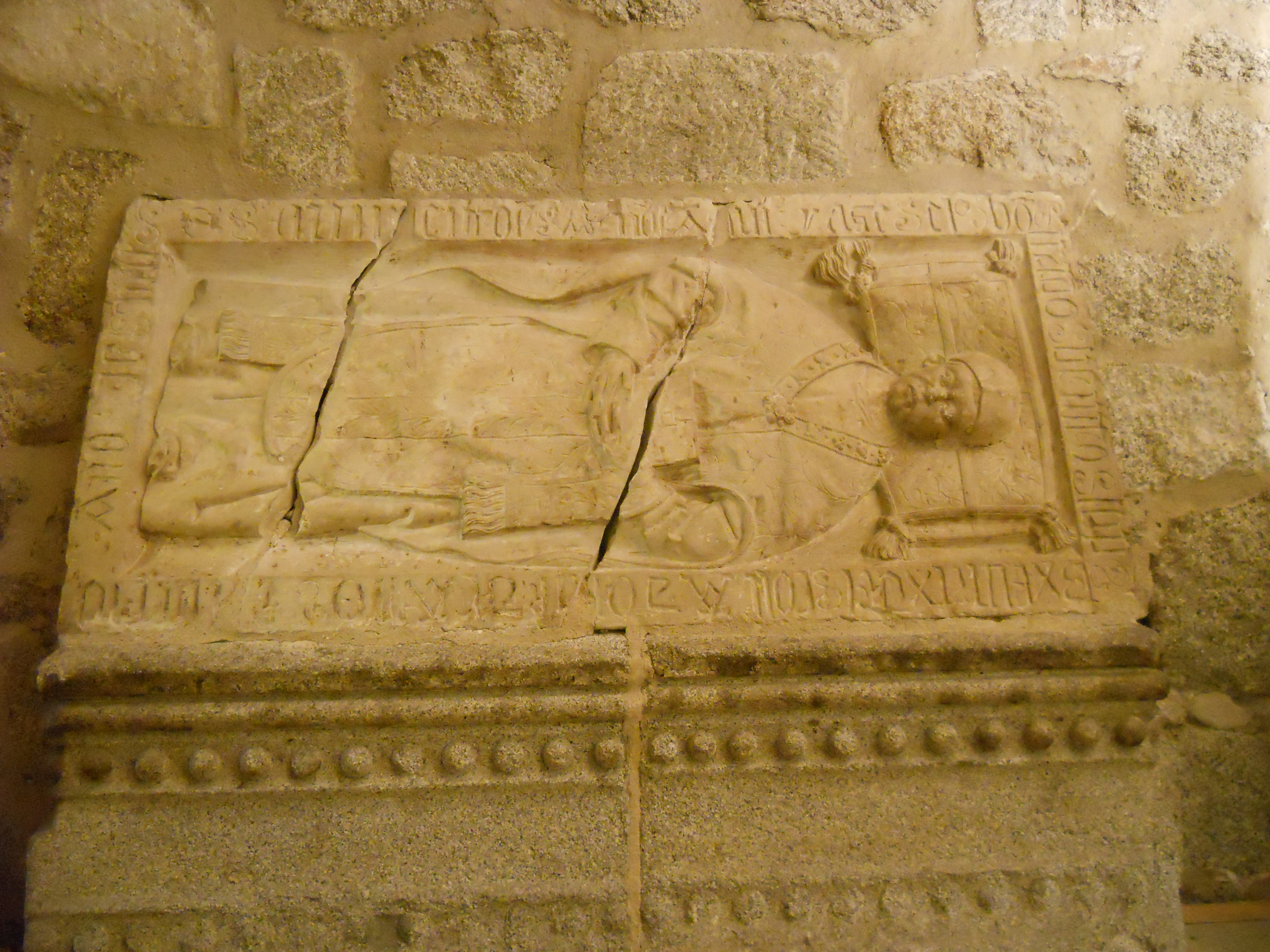 Tumba en el interior de la basílica de Nuestra Señora de la Asunción, Colmenar Viejo, Madrid, España